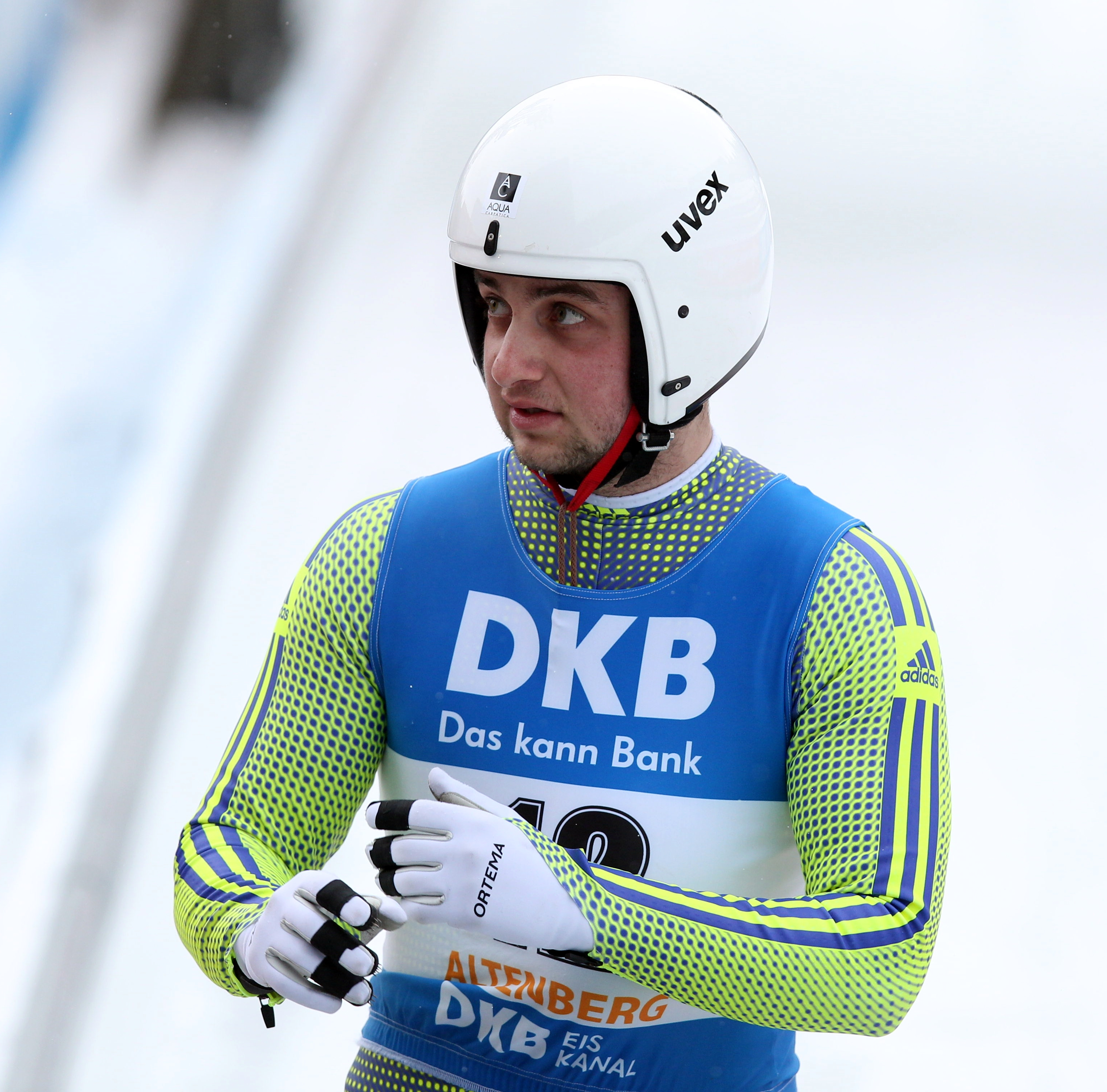 Stefan Musei beim Rennrodel-Nationencup der Doppelsitzer in Altenberg 2017